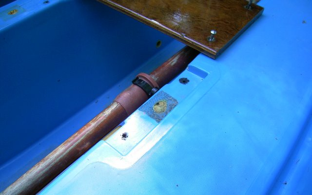 Piaf (Jolle) mit abgeschraubter Querducht, Öffnung der ausgeschäumten Längsducht ist erkennbar.